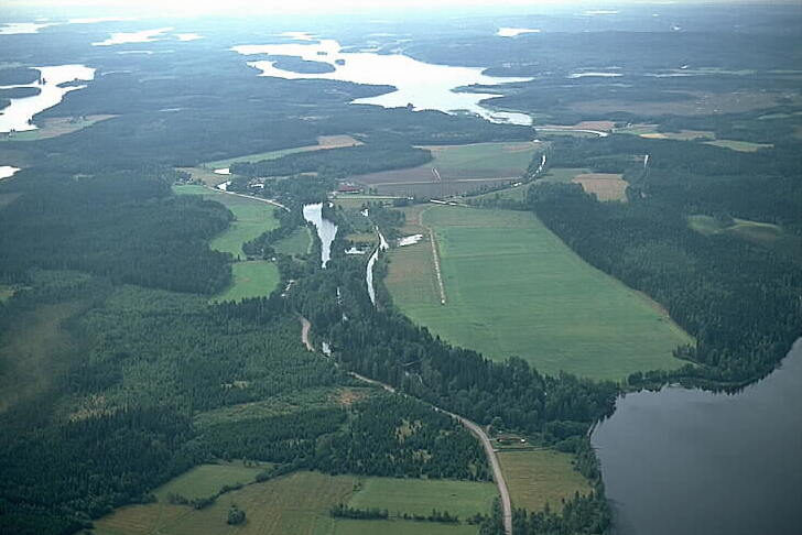 Bjurbäcks kanal Motiv: Bjurbäcken Nyckelord: Flygbilder, Riksintressen Kategori: Miljöer, OdlingslandskapBjurbäcks kanal.